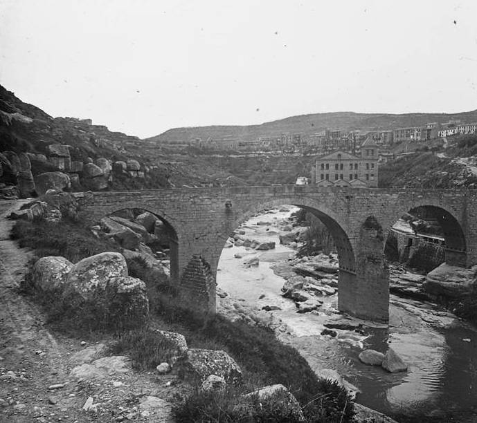 Pont de Puig-reig. Josep Salvany i Blanch (1917)